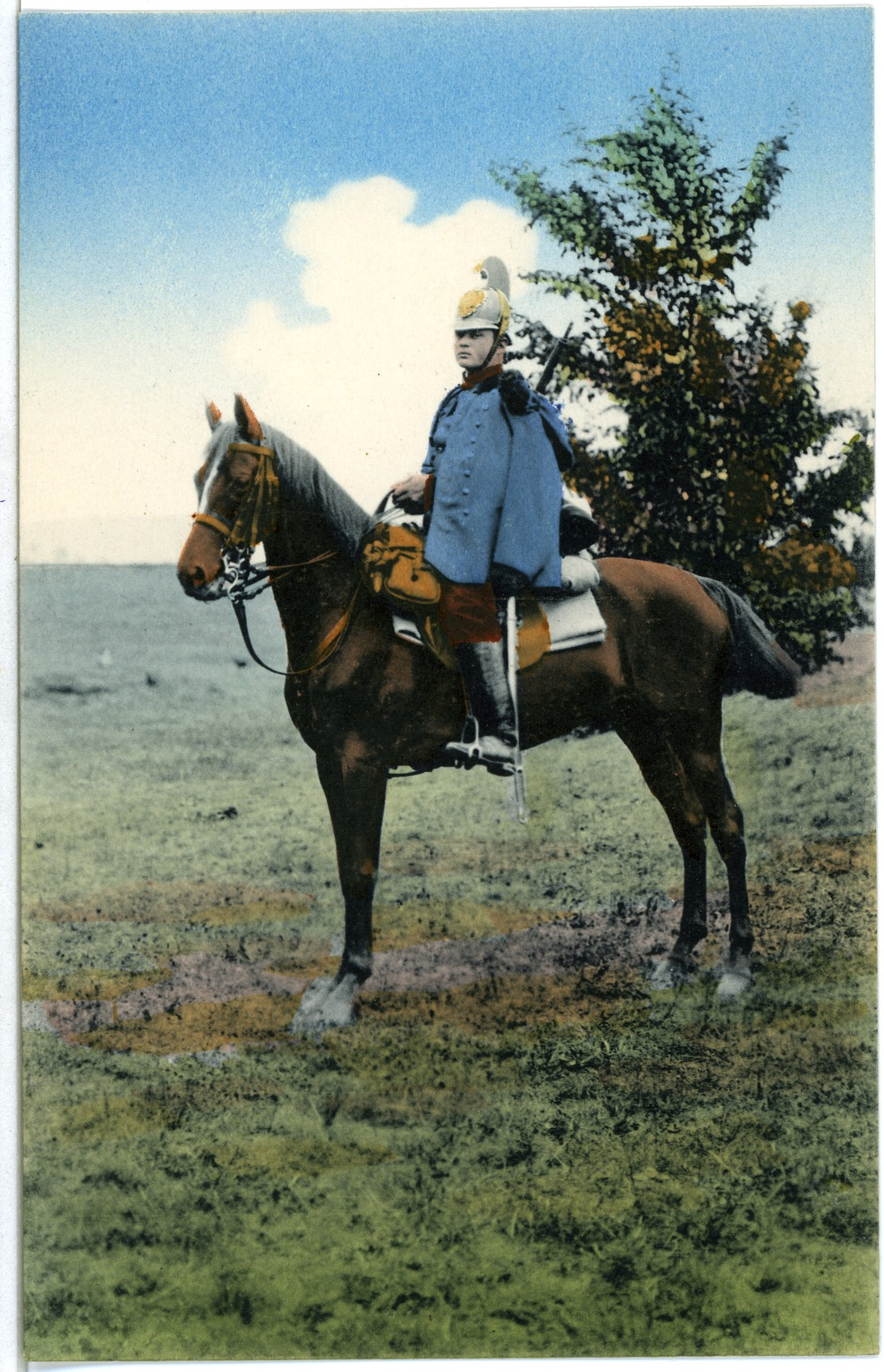 Theresienstadt; Reiter vom Dragoner-Regiment This postcard is from publisher Brück & Sohn in Meißen ( This postcard has a unique number 03773 and is available in a higher resolution at the publisher. This images was uploaded in a cooperation project between Wikipedians and the publisher.